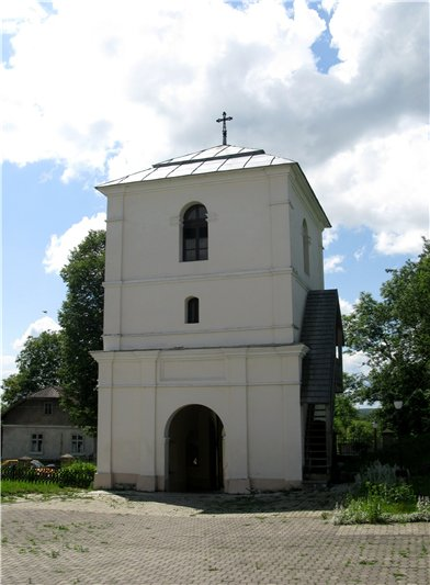 Дзвіниця церкви Святого Пантелеймона: Дзвіниця церкви Святого Пантелеймона в с. Шевченкове поблизу міста Галич (Галицький район Івано-Франківської області). Побудована у XVI ст.